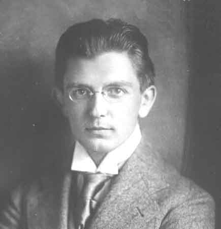 Alfred Hoehn, deutscher Pianist, Klavierlehrer und Herausgeber der Beethovenschen Klaviersonaten für die Edition Schott